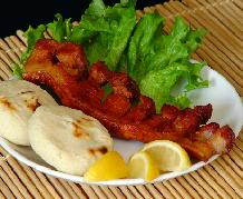 Chicharrón de la región paisa